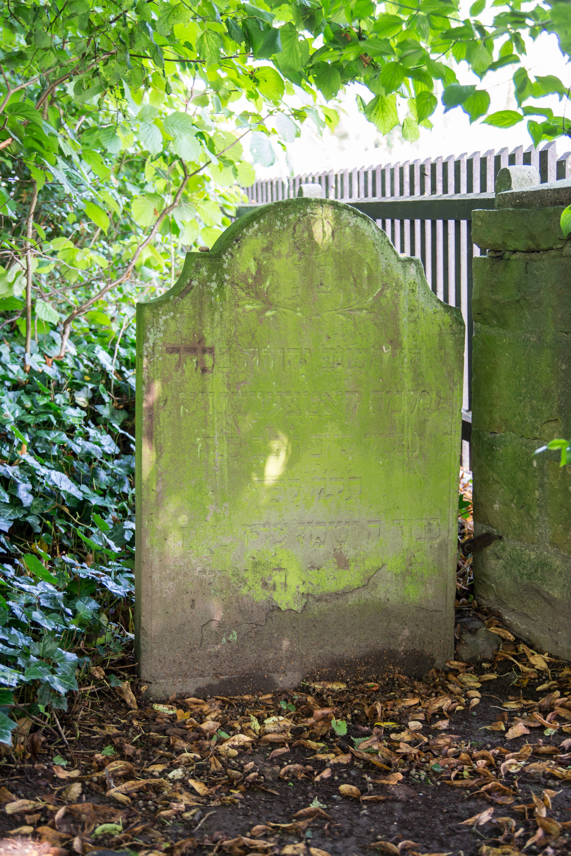 This image shows a heritage building in Germany, located in the North Rhine-Westphalian city Lügde (no. 86). Jüdischer Grabstein an der Evangelischen Kirche in Elbrinxen